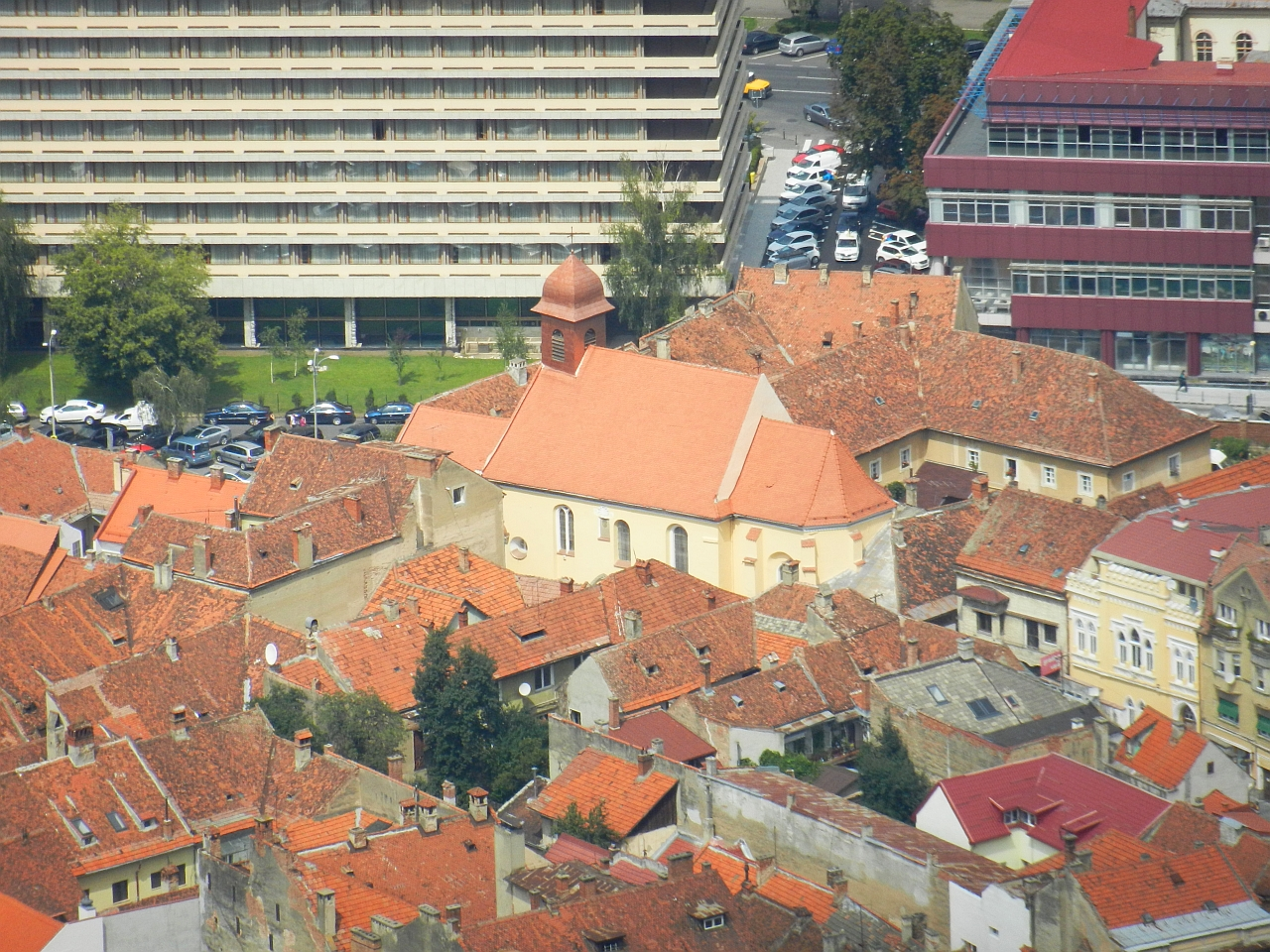 Biserica „Sf. Ioan” a mănăstirii franciscane 01